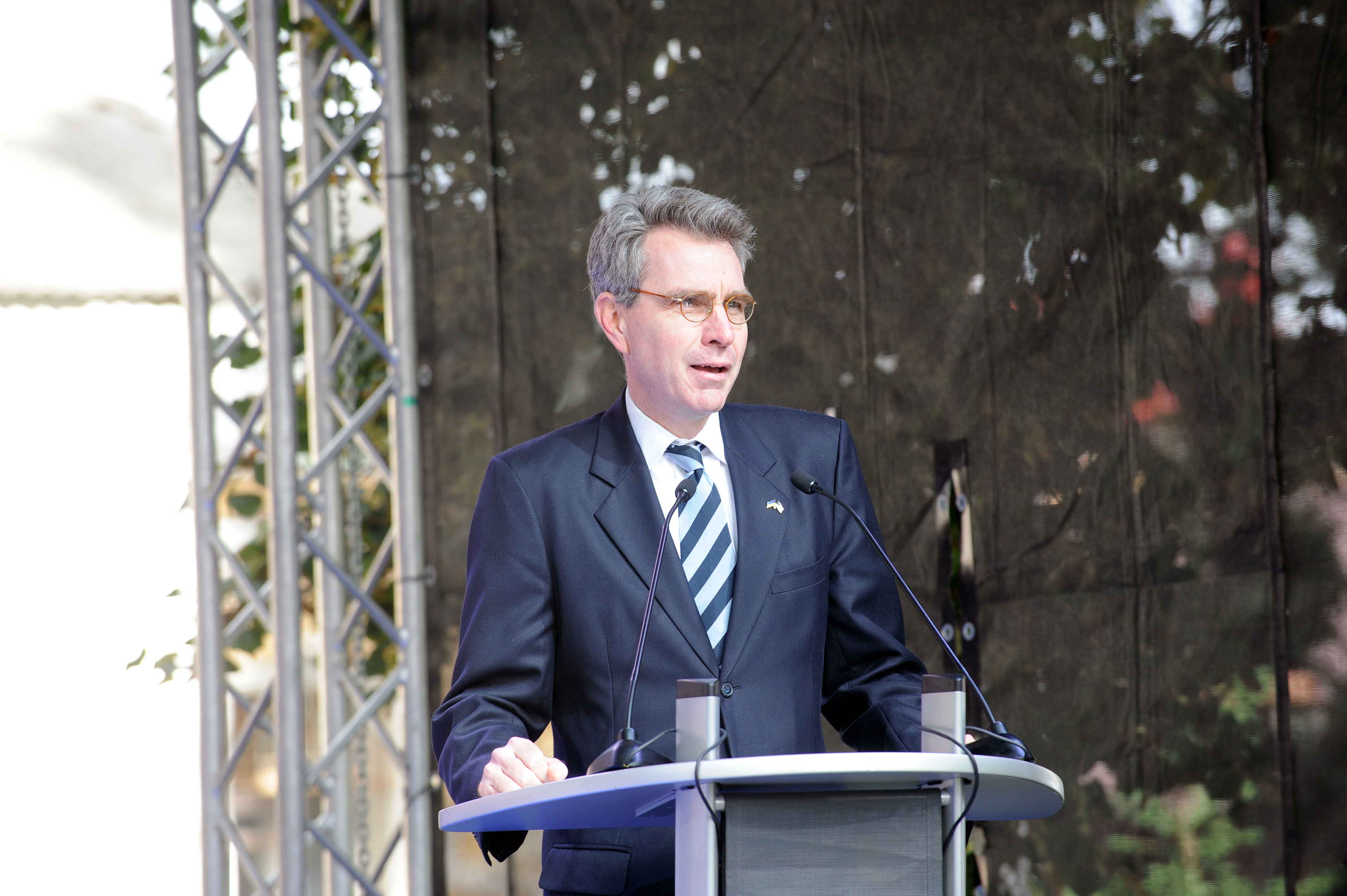 Церемонія відкриття BIONIC University. Посол США в Україні Джеффрі Р. Пайєтт.